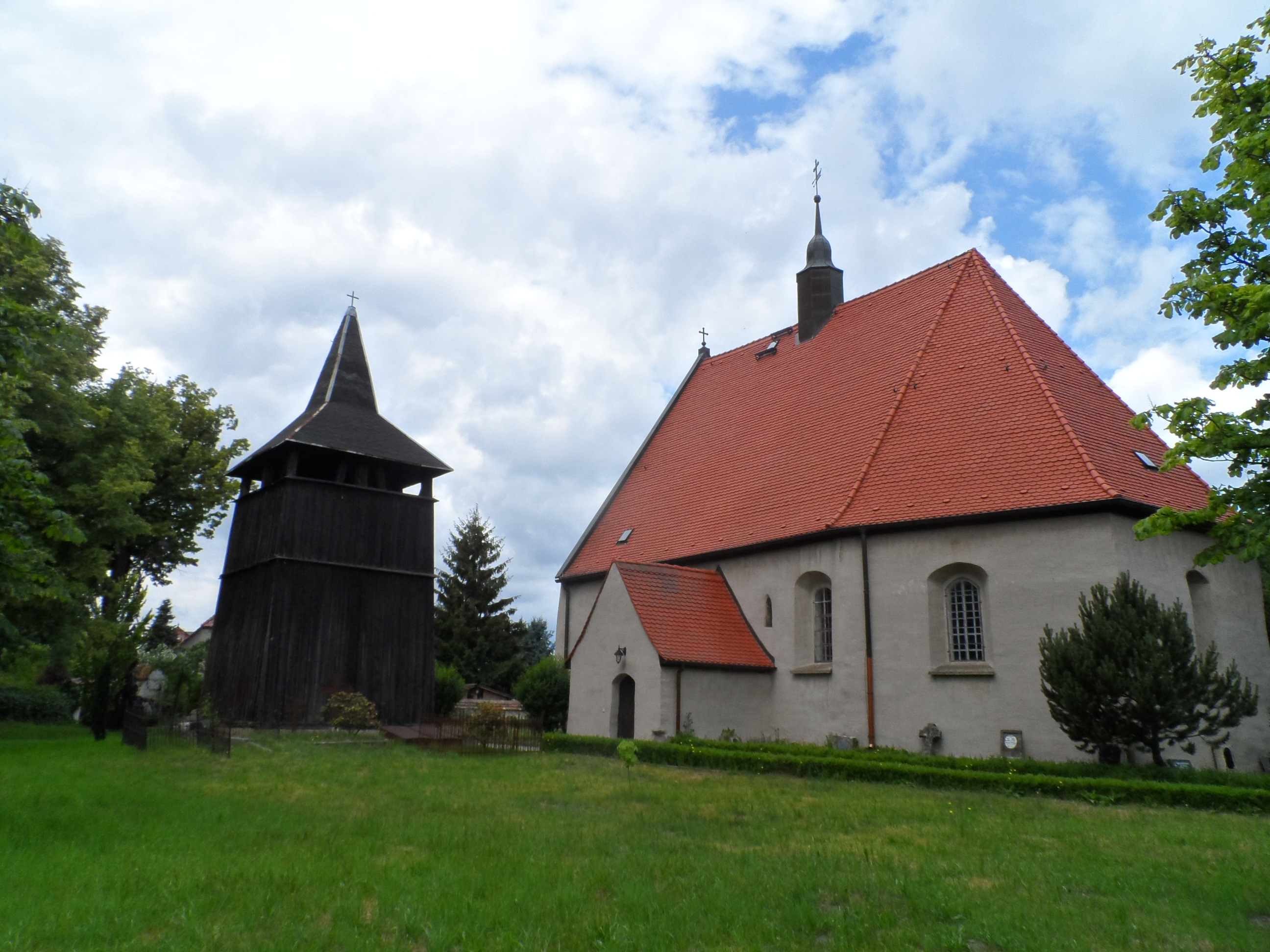 Laurentiuskirche